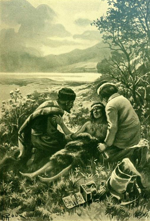 Illustration from Verne - Les Naufragés du Jonathan, Hetzel, 1909.djvu